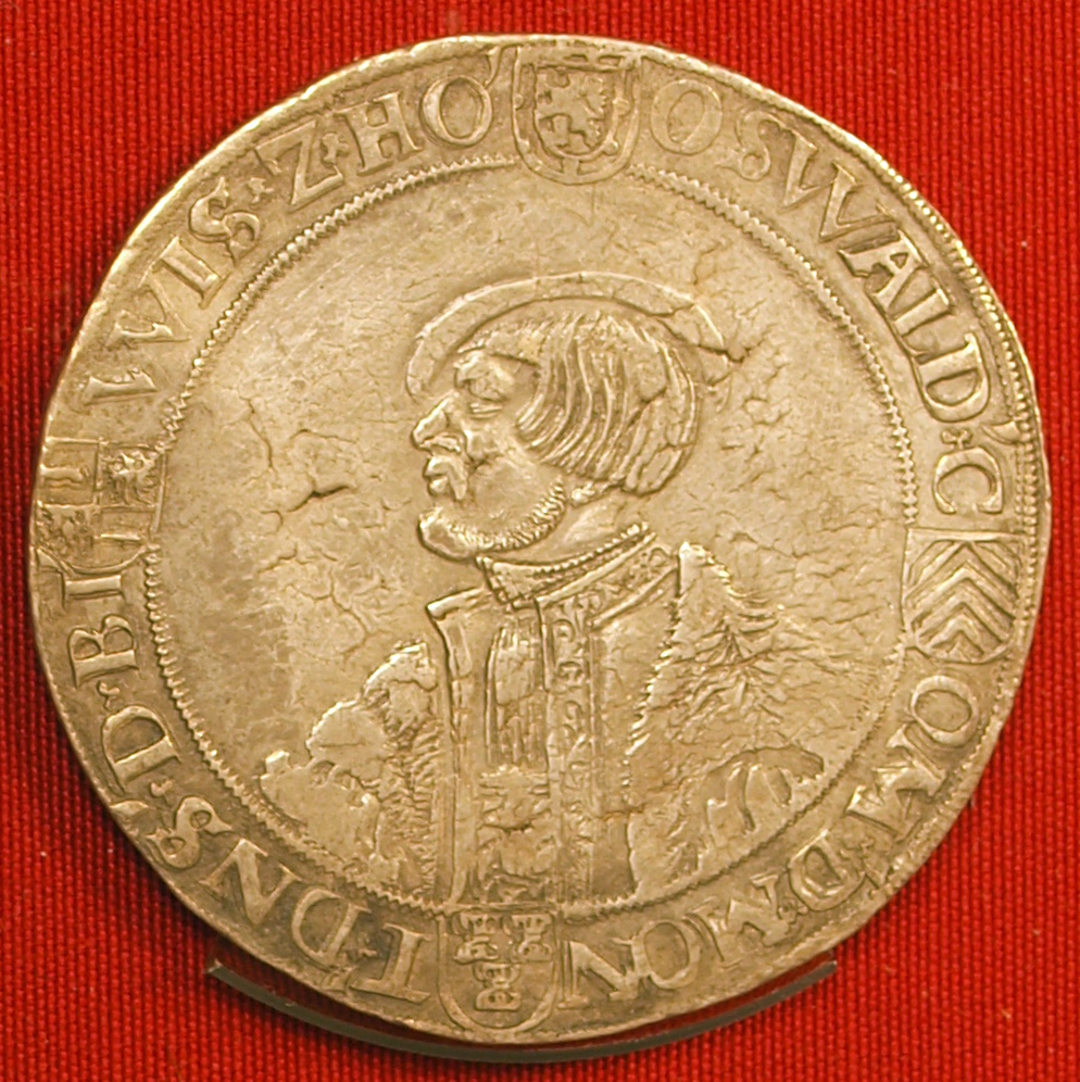 Daalder met het portret van Oswald II, 1511-1546, Hagemunten, De munt van 's-Heerenberg.